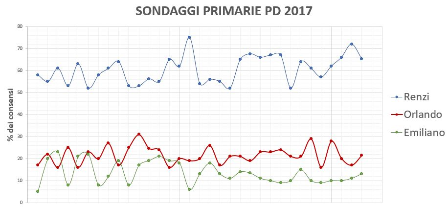 Andamento dei sondaggi per le primarie del Partito democratico in Italia del 2017.